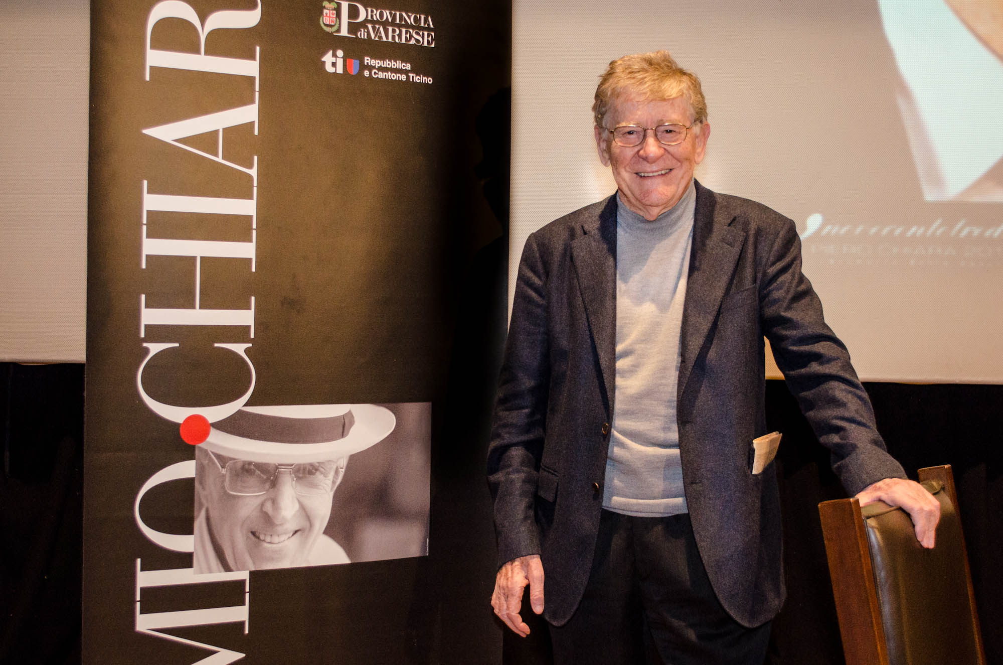 Premio alla carriera a Ermanno Olmi conferito dall'associazione "Amici di Piero Chiara"